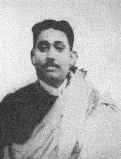 Rash_bihari_bose